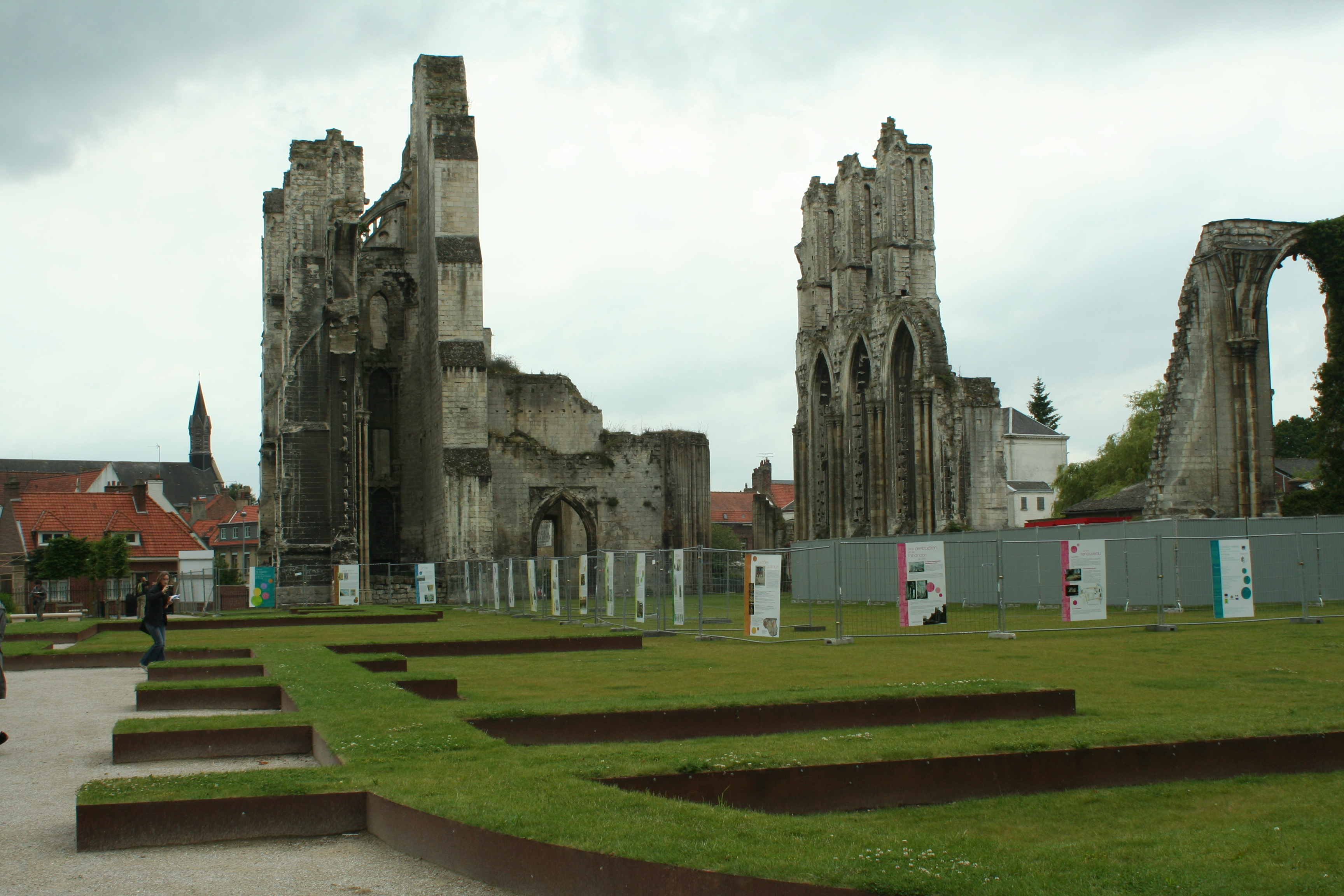 Ruines de l'abbatiale Saint-Bertin de Saint-Omer, vues depuis le chevet.